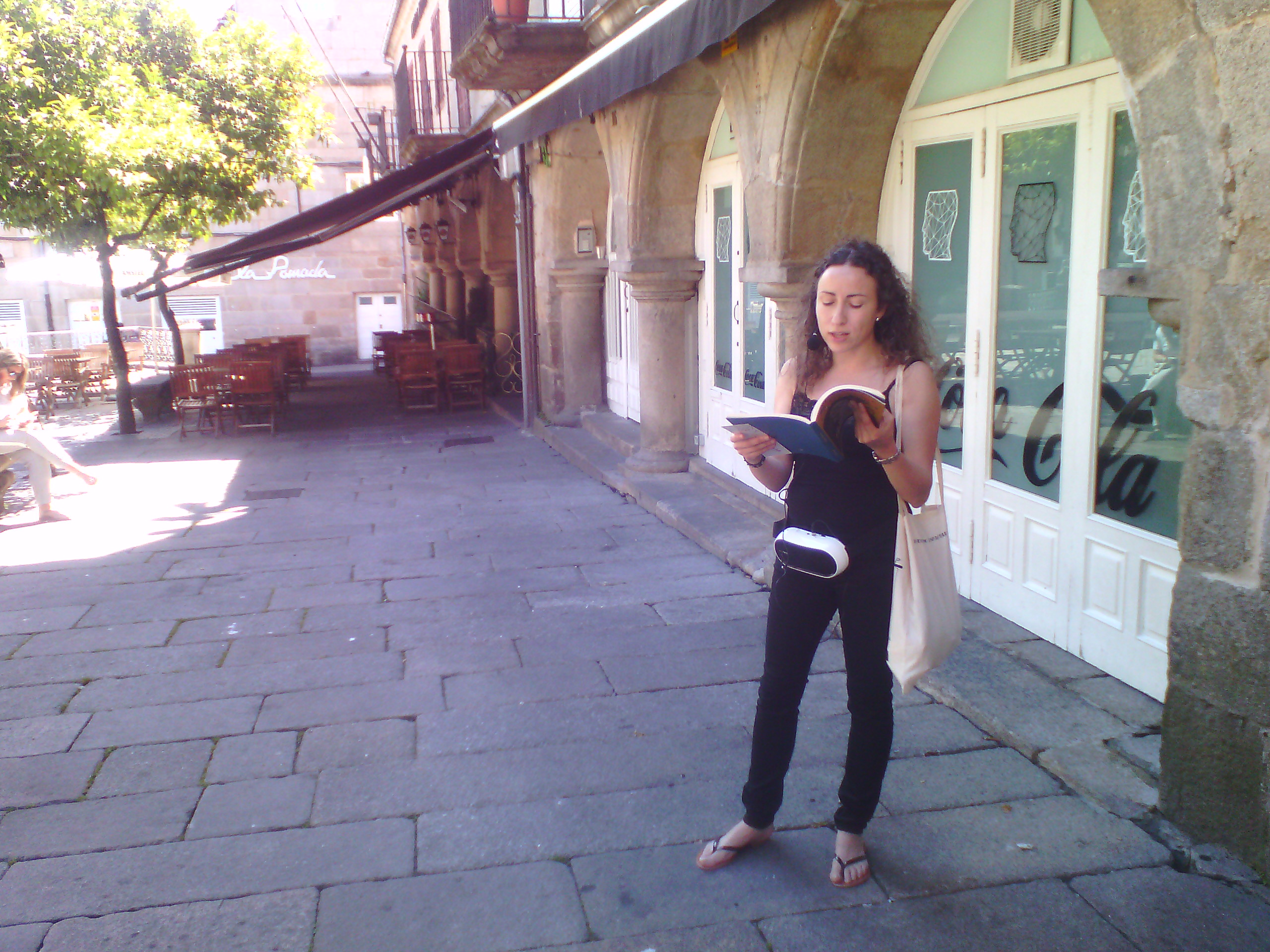 Lucía Novas recitando na praza do Teucro de Pontevedra